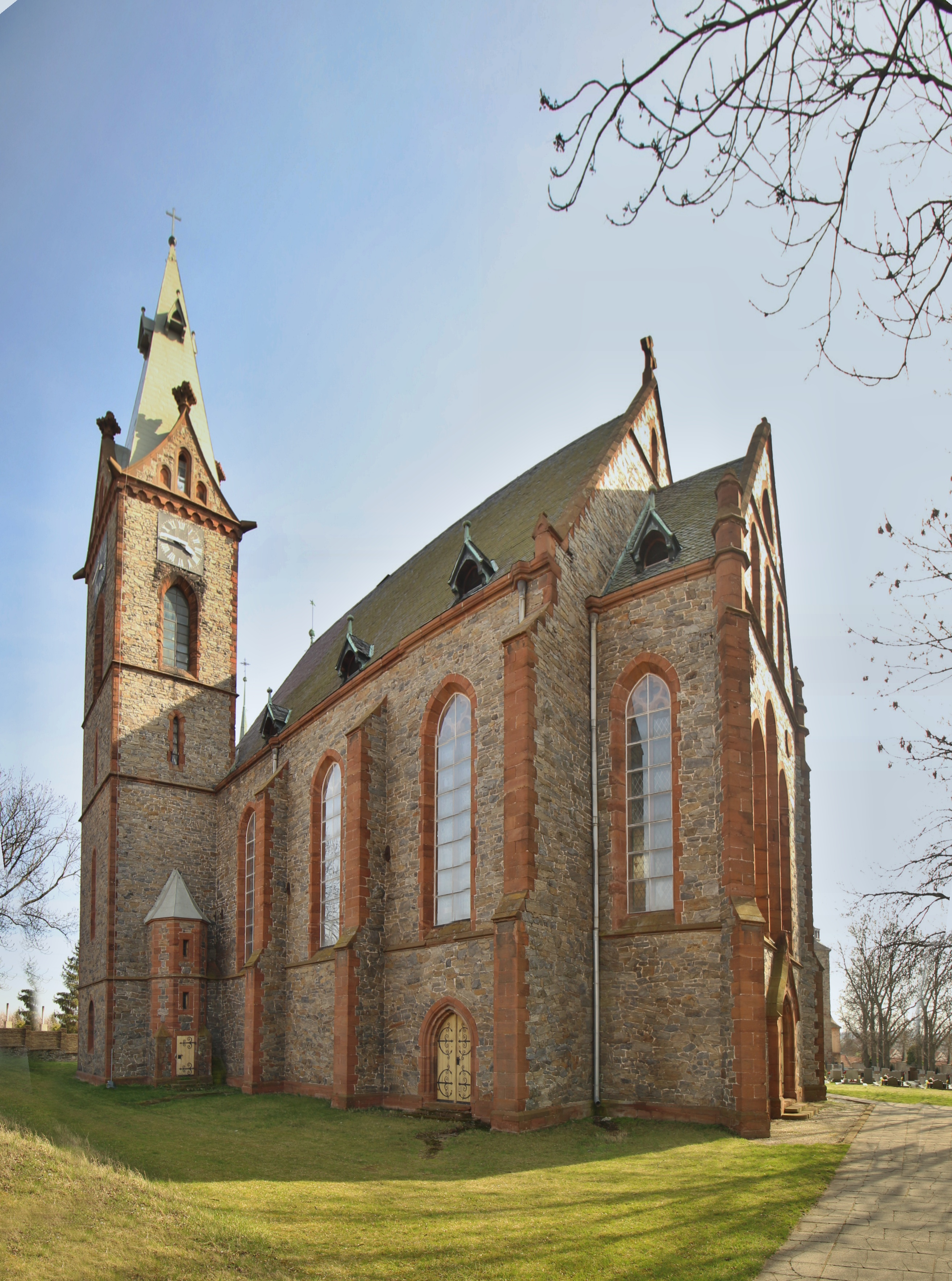 Plaňany kostel Narození sv. Jana Křtitele